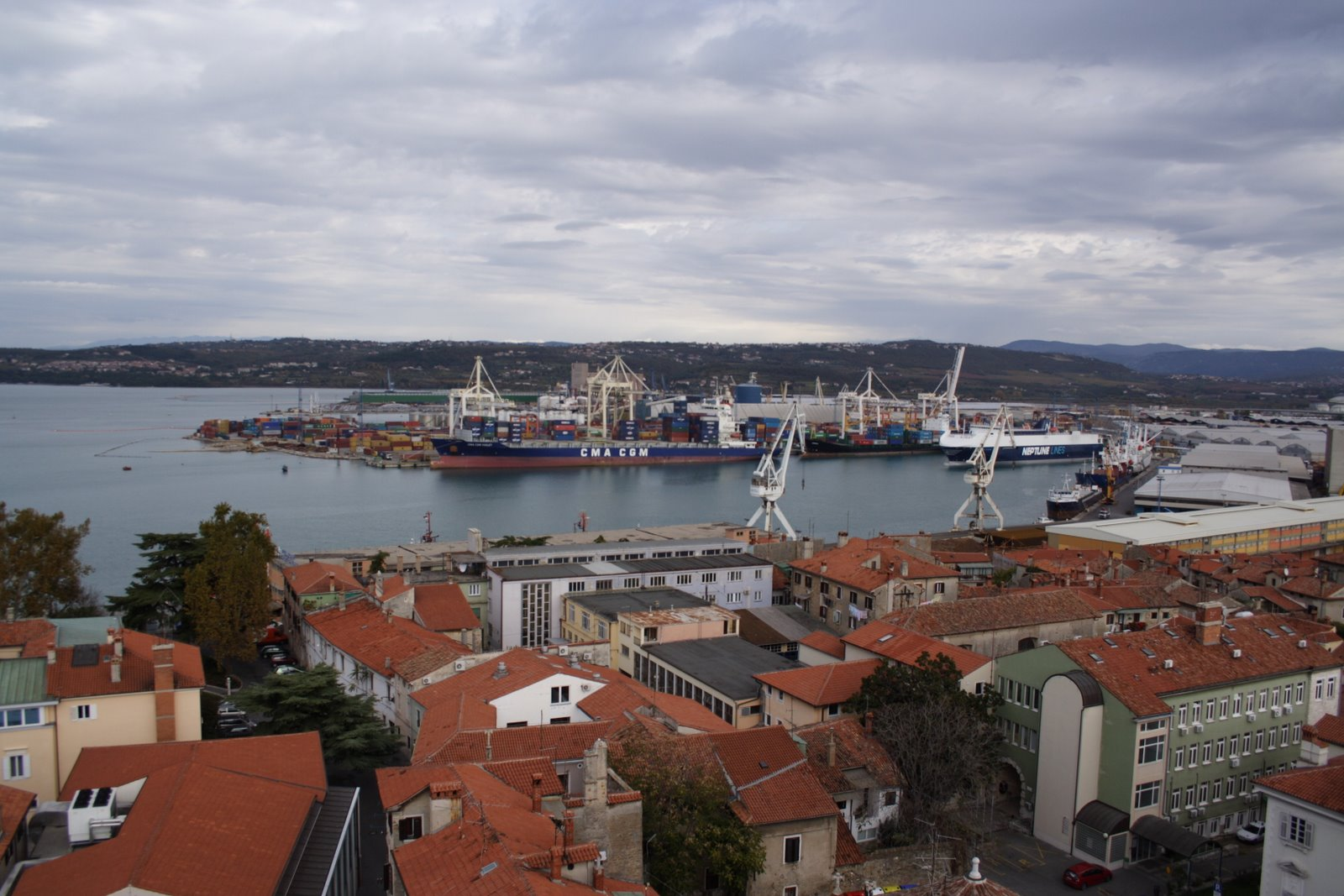 Koper